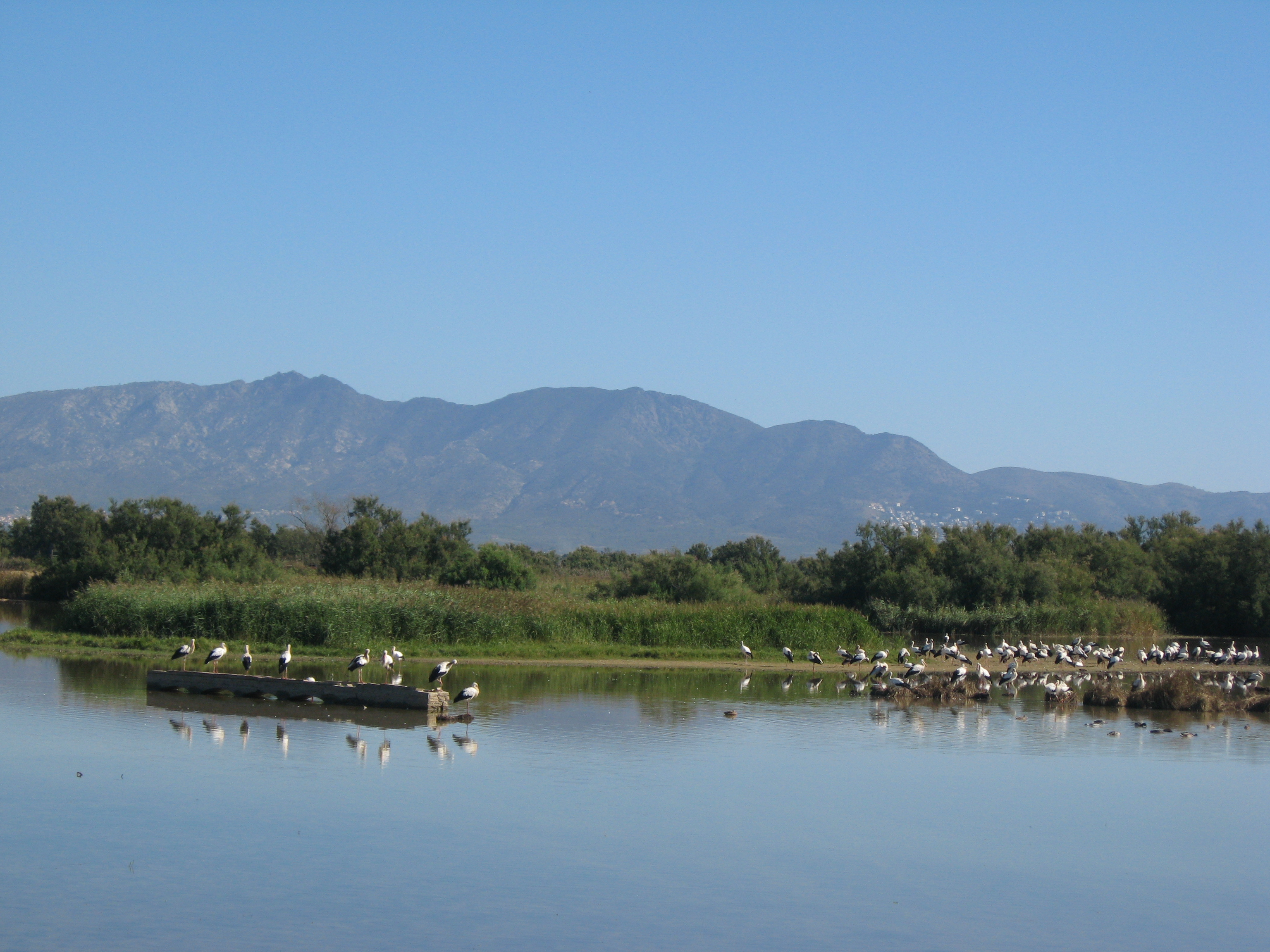 Naturpark Aiguamolls (Spanien/Katalonien) Datum: 15.09.2010 Urheber: Michael Pfeiffer alias Benutzer:Gordito1869 Quelle: privates Fotoarchiv des Urhebers